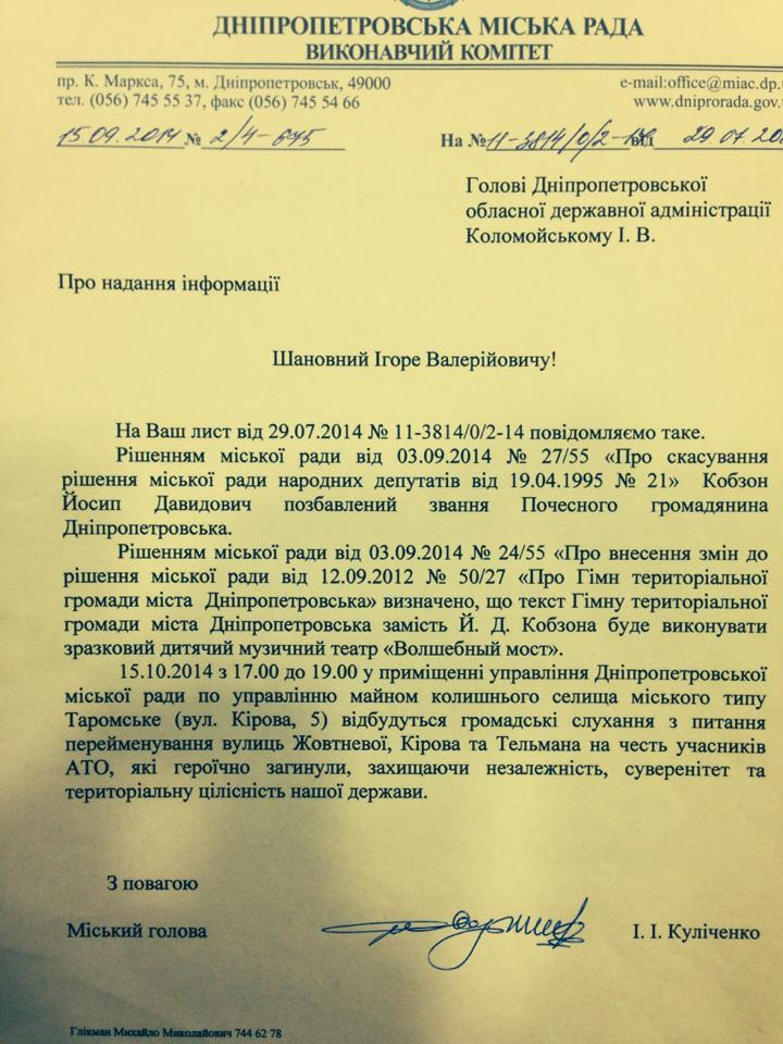 Днепропетровский горсовет лишил Кобзона статуса почётного гражданина